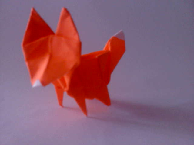 origami fox